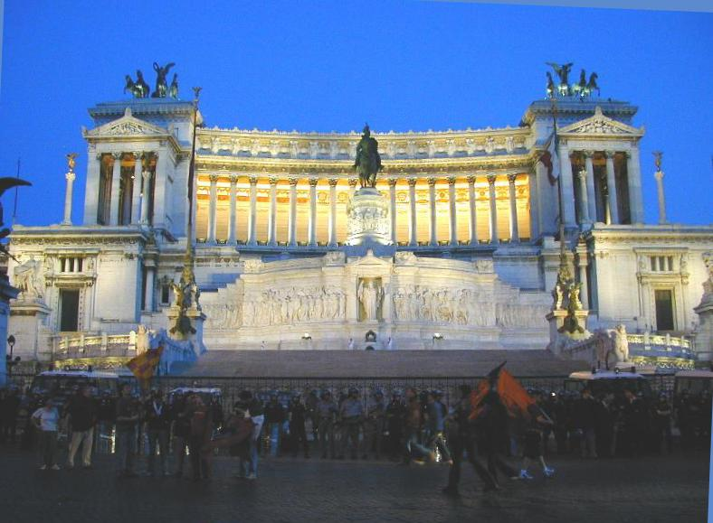 Roma, piazza Venezia: servizio d'ordine pubblico al Vittoriano (giugno 2001, Roma campione d'Italia)